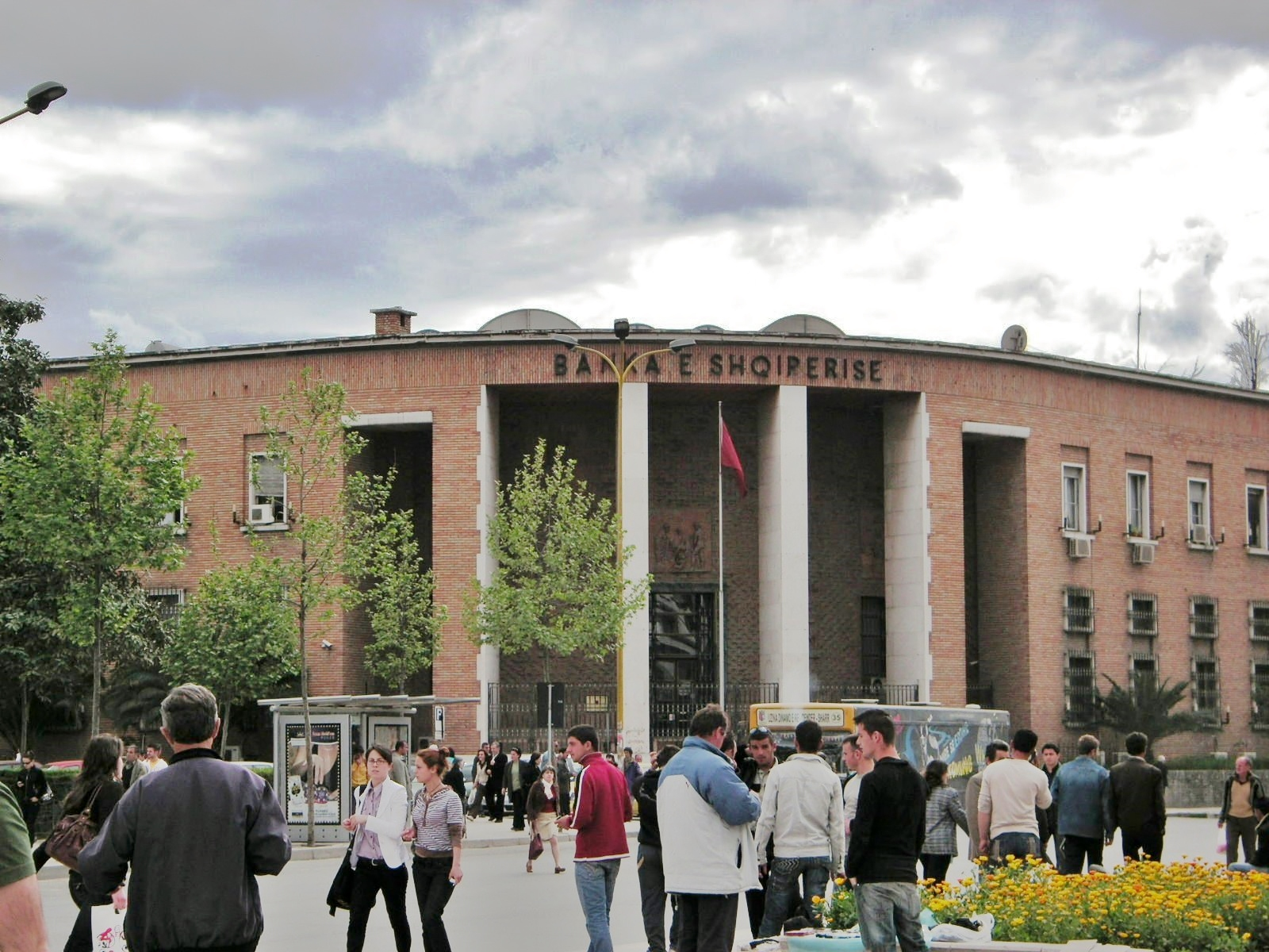 Tirana.